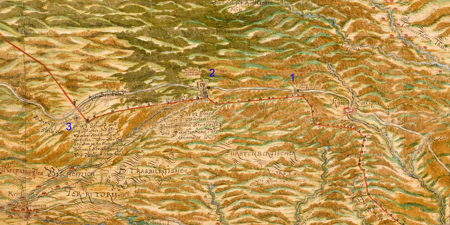 Ausschnitt der Karte von Georg Ludwig Stäbenhaber "Freudenstädter Forst samt dem Waldgeding alle mit ihren Markungen und angrenzenden Forsten, darin auch die Ämter Freudenstadt und Dornstetten", markiert sind die Kleine Schanz(1), die Alexanderschanze(2) und die Schwedenschanze(3).